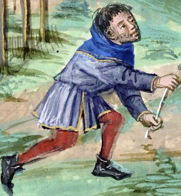 Охотник, на котором надета синяя котта. Фрагмент миниатюры из "Les Livres du roy Modus et de la royne Ratio" Генри де Феррьера, ок. 1455. Королевская библиотека Брюсселя, Бельгия